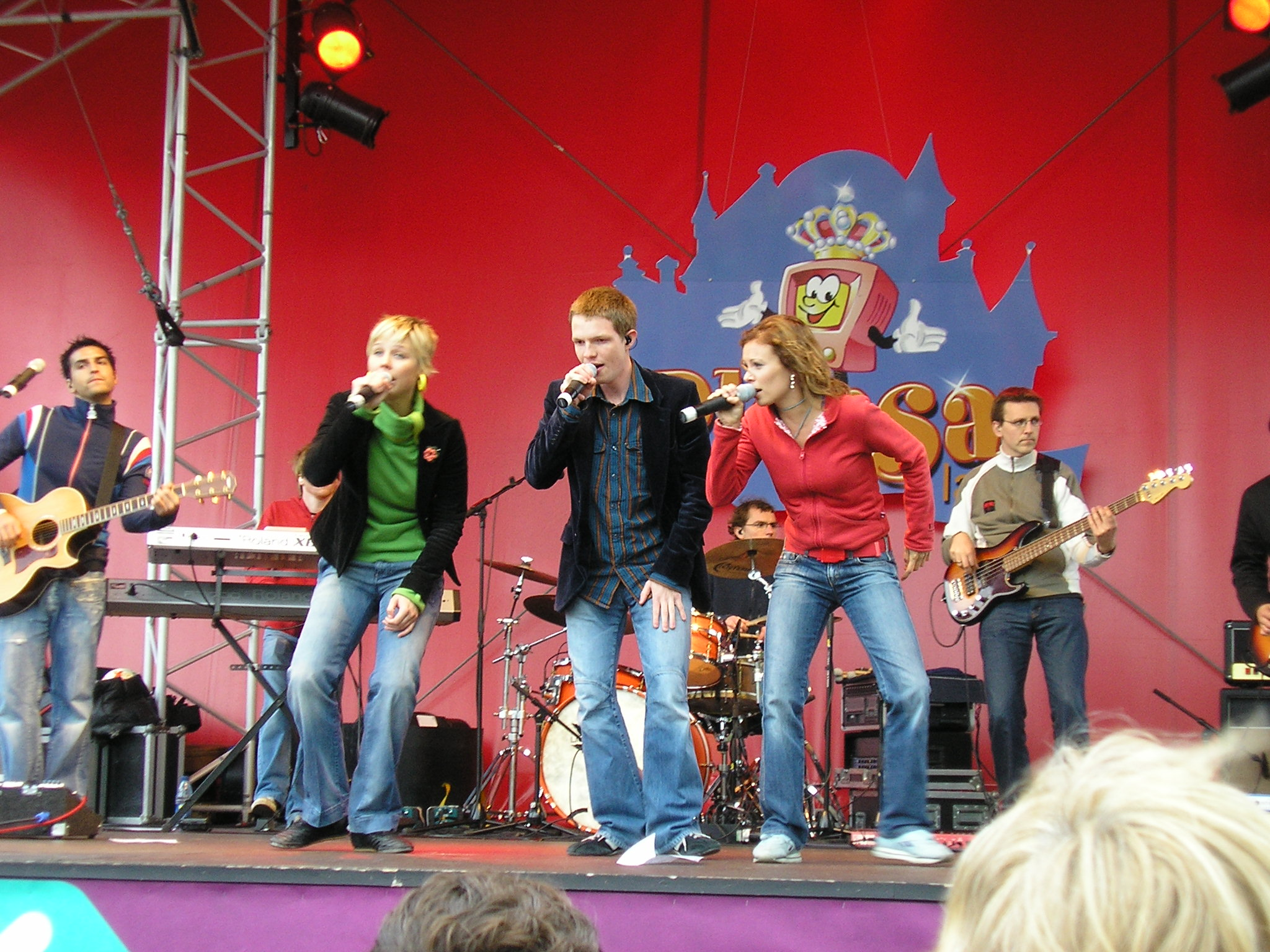 Spring, in Plopsaland De Panne, 21 mei 2006. Van links naar rechts: Damian Corlazzoli (gitaar), Cara Van der Auwera, Jelle Cleymans, Anneleen Liégois